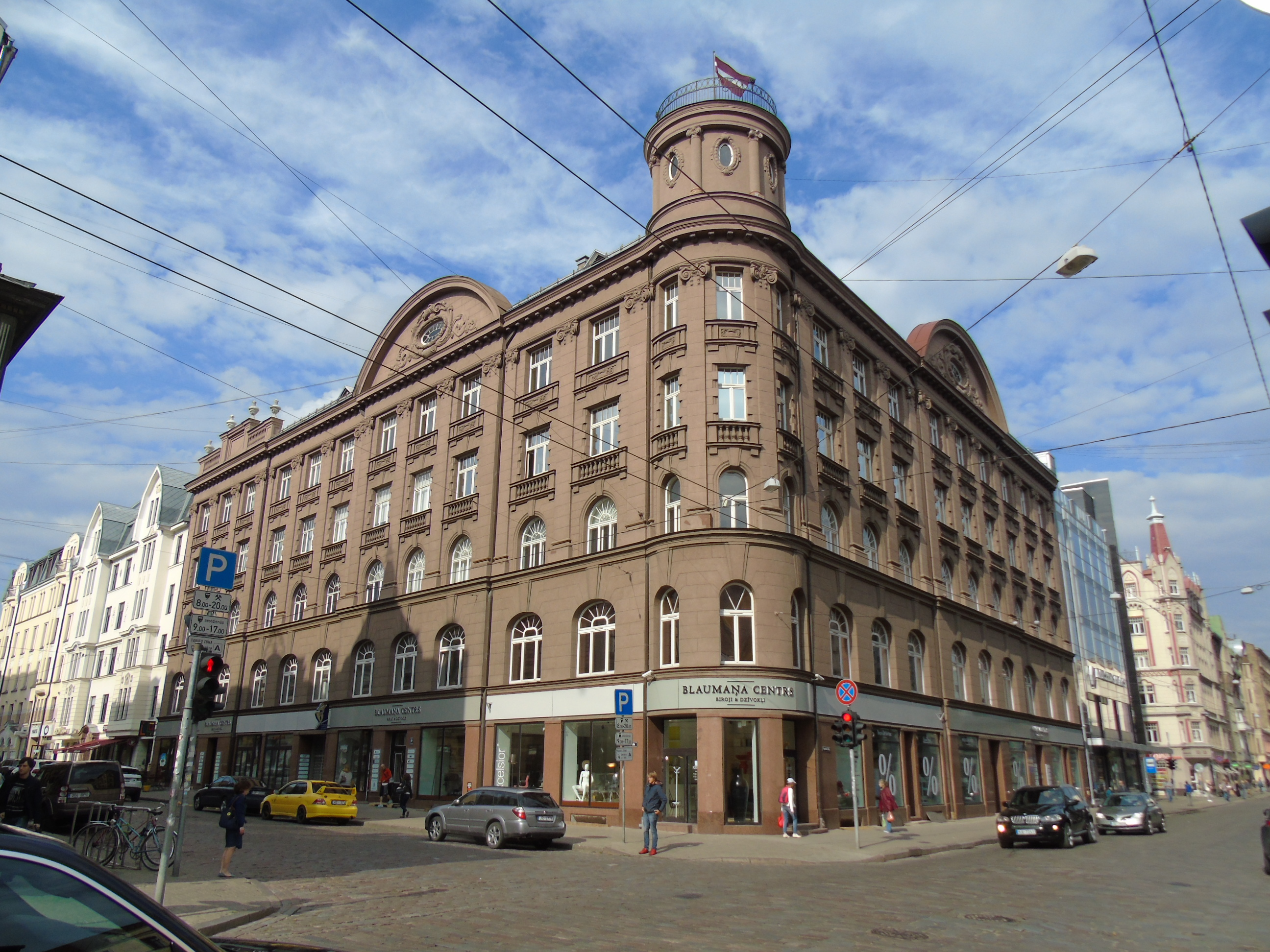 Adminstratīvā ēka, Rīga, Blaumaņa iela 5a; Tērbatas iela 23/25